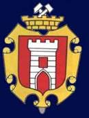 znak obce Krásná Hora nad Vltavou